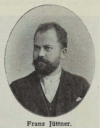 German cartoonist and illustrator Franz Jüttner in 1897